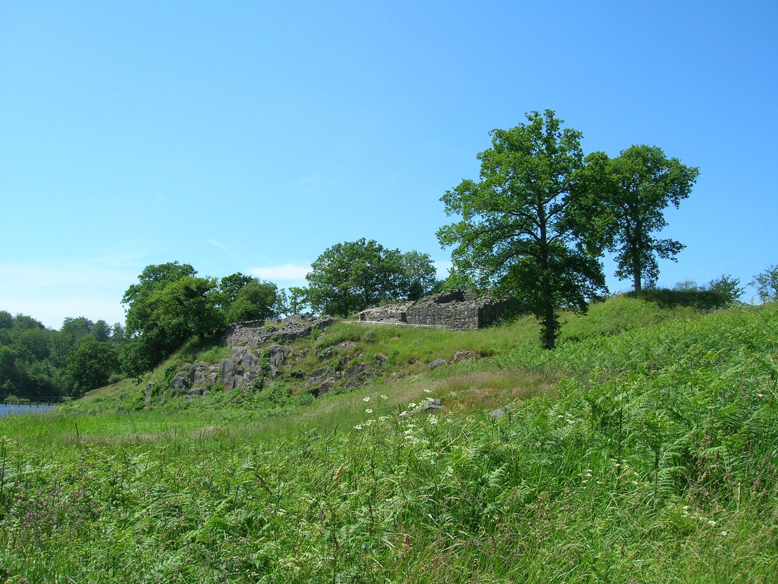 Lilleborg - Bornholm - 2005